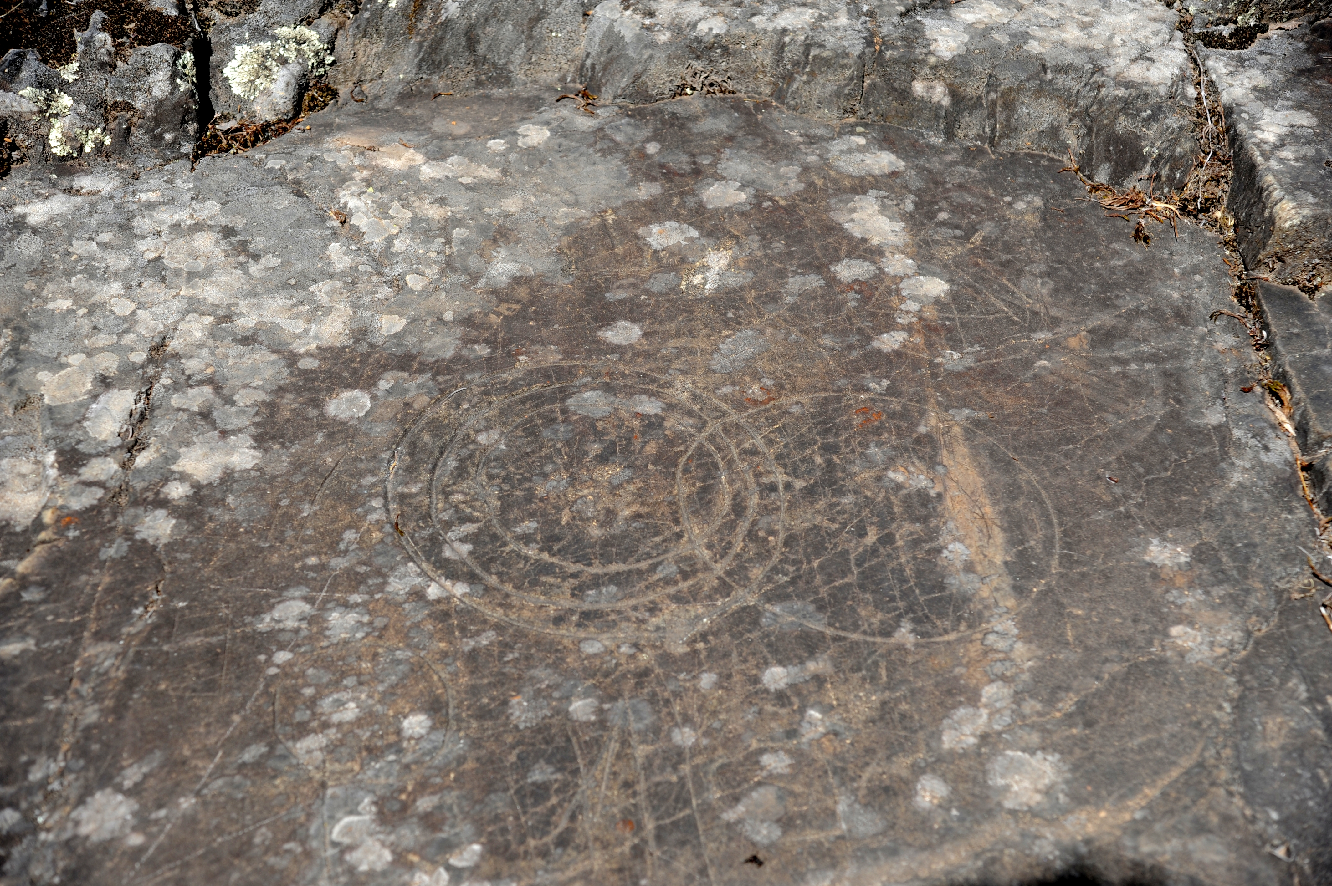 Arte rupestre de Extremadura Petroglifos de Aceitunilla (Las Hurdes)